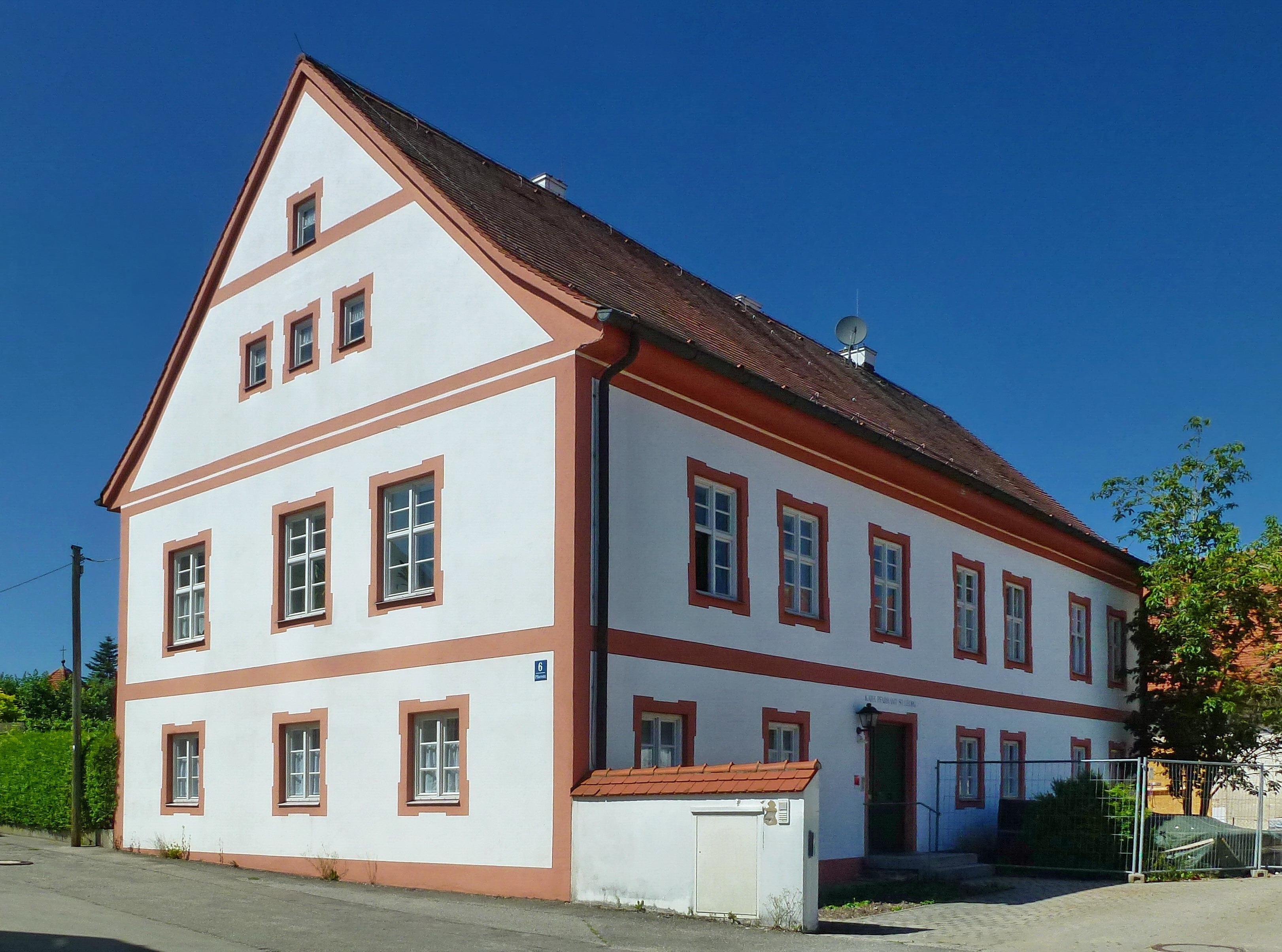 Aufkirchen (Gde Egenhofen, LKr Fürstenfeldbruck), Pfarrstr. 6 Pfarrhaus. Ansicht von SO